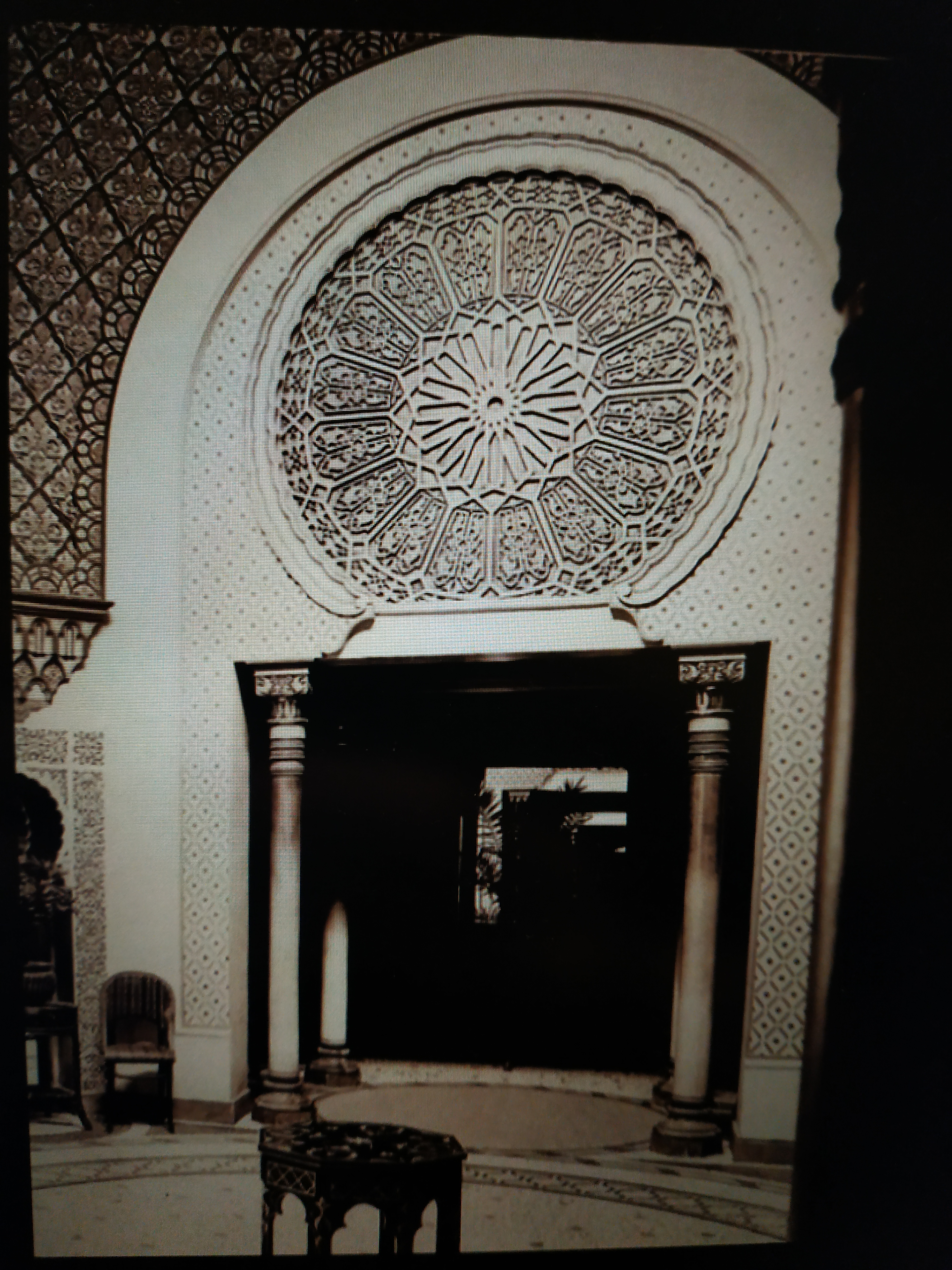 Porte Ottomane d'un des salons du Palais Oriental (Reims)